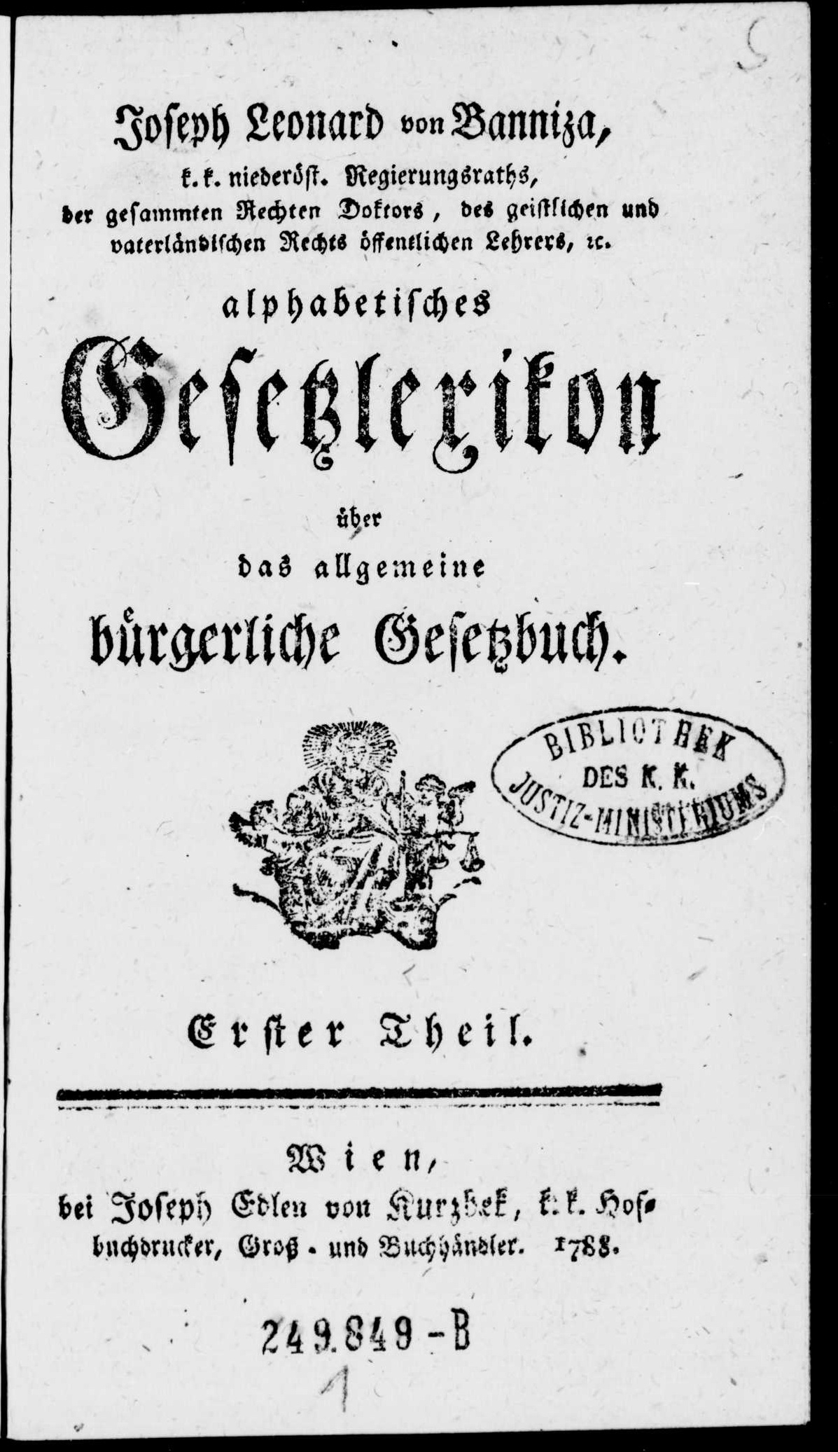 Frontespizio